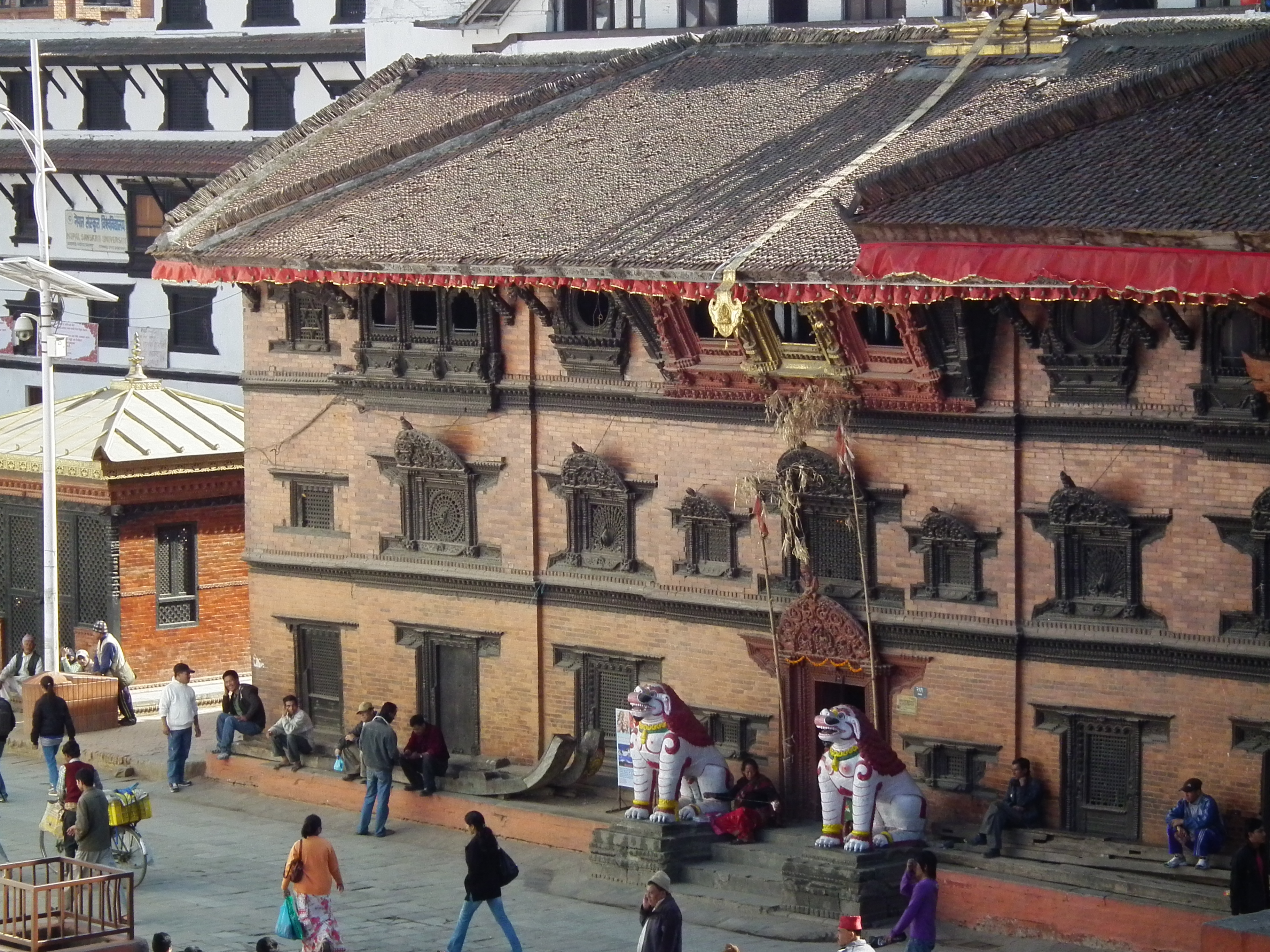 Basantapur Kathmandu Nepal